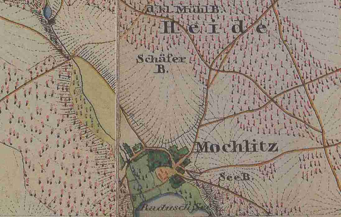 Mochlitz, Gemeindeteil der Gemeinde Jamlitz, Lkr. Dahme-Spreewald, Brandenburg, Deutschland, Ausschnitte aus den Urmesstischblätter 3951 Trebatsch und 3952 Groß Muckrow kombiniert